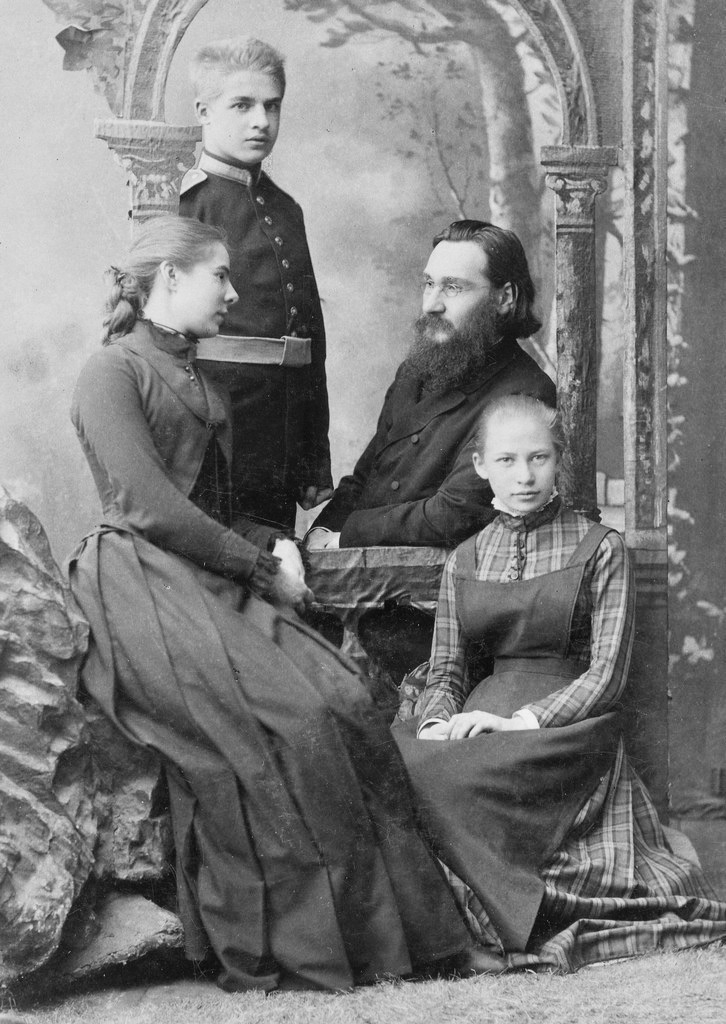 Мечников з дружиною та її братом і сестрою.jpg